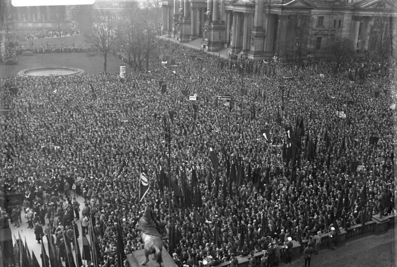 Der grosse Aufmarsch der Republikaner zur Preussenwahl im Lustgarten in Berlin ! 80.000 Republikaner der Eiserne Front im Lustgarten in Berlin, vom Berliner Schloss aus gesehen.